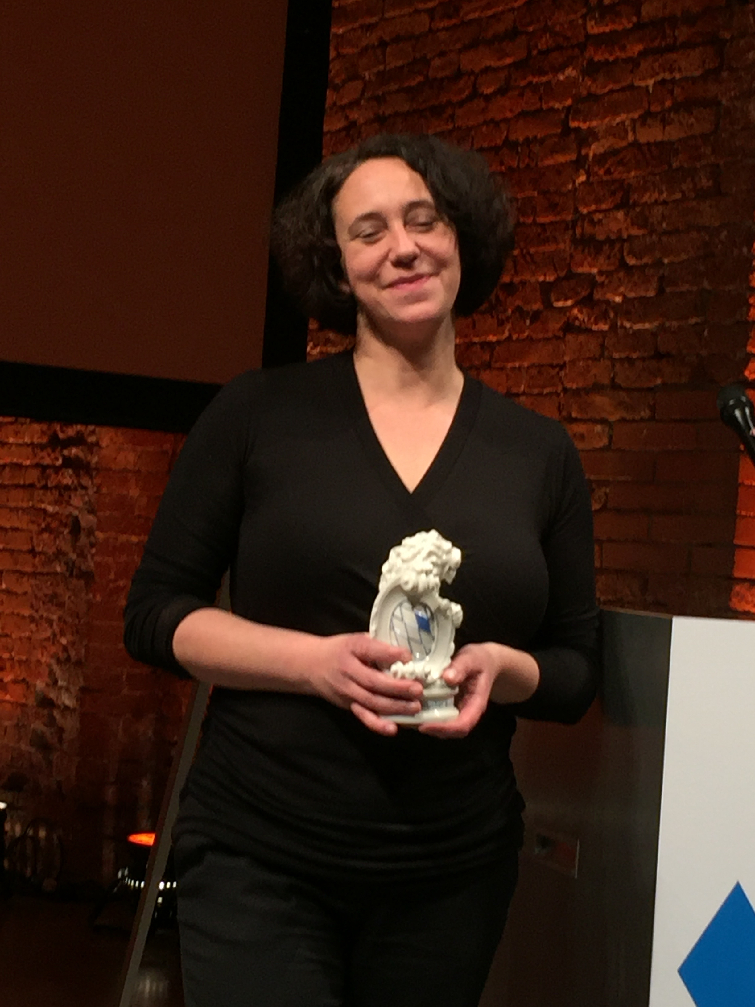 Bayerischer Buchpreis 2018 - Lucy Fricke erhält den Preis in der Kategorie Bellestristik für ihren Roman "Töchter"